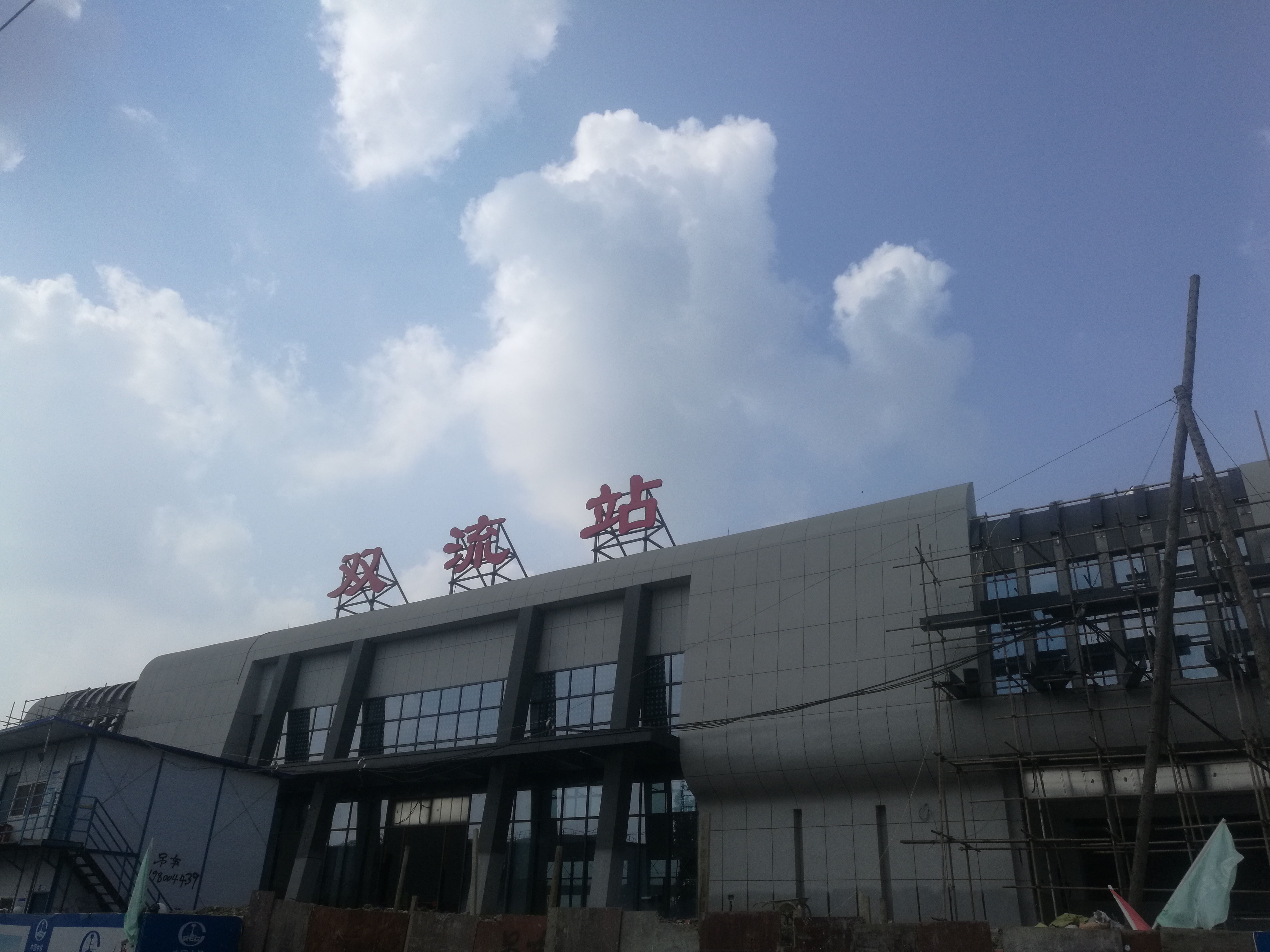 正在建设中的双流火车站站房